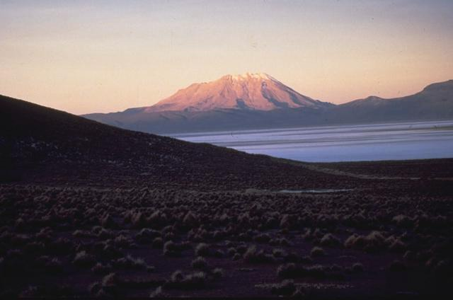 Ubinas volcano, Peru